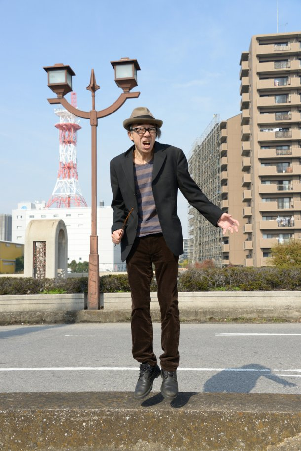 2012年川口元郷にて／撮影：石田亮介